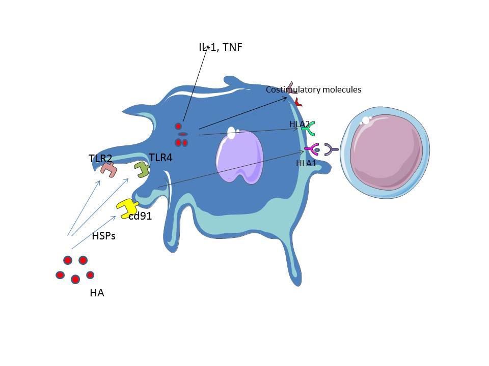 les HSPs libérées par les particules d'HA interagissent avec les CPAs